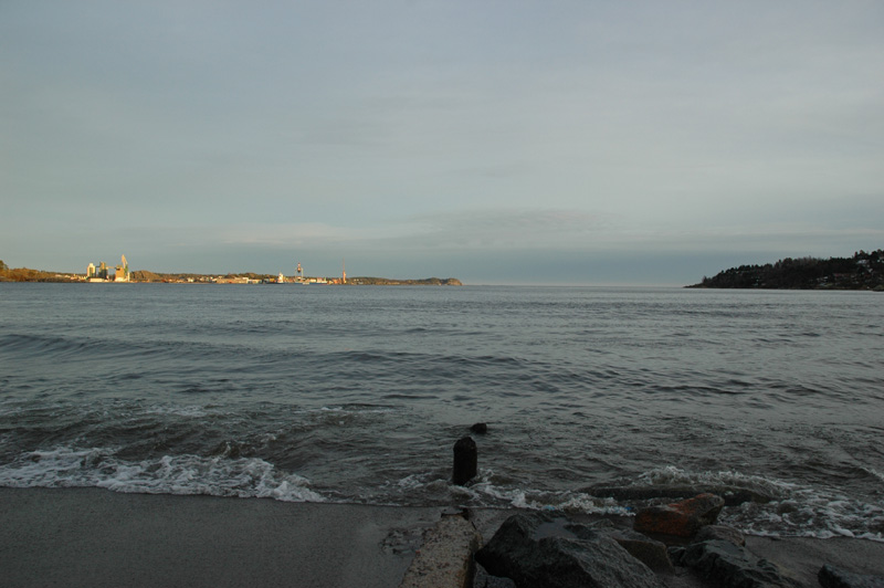 Larviksfjorden sett fra Batteristranden